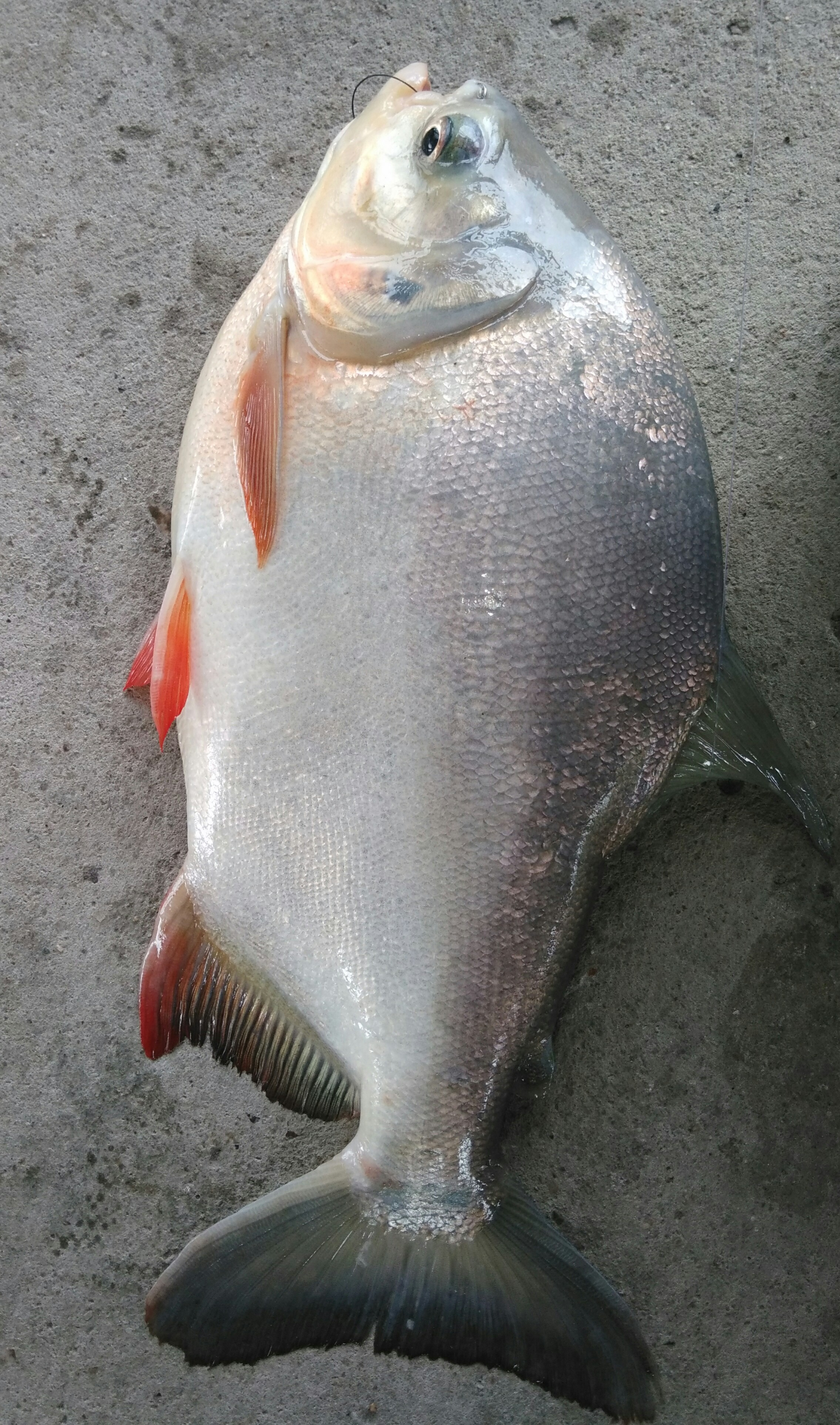 Hình tự chụp bằng máy di dộng cá nhân về một con cá chim sông (cá chim nước ngọt) câu được tại Khu câu cá giải trí Phương Nam, địa chỉ số A18/553C ấp 1, xã Phong Phú, huyên Bình Chánh (từ trung tâm Thành Long, chạy thẳng vào bên trong sẽ gặp khu câu cá giải trí – ẩm thực Phương Nam)